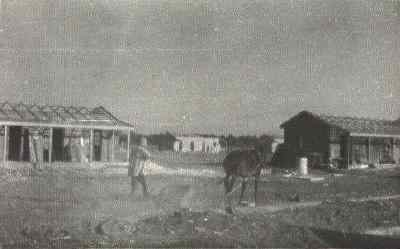 Beschriibig: Reschafim 1949 – Bsitzer: Kibbuz Reschafim